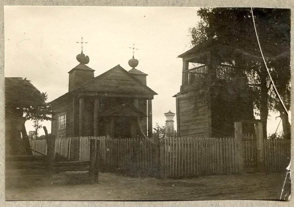 Царква ў вёсцы Азярычына ў пачатку XX ст.Беларуская (тарашкевіца): Азярчына (Aziaryčyna). Казьмадзям’янаўская царква-капліца